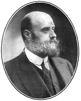 Retrato de Bernardo Sagasta Echevarría, en la revista La Ilustración Española y Americana.